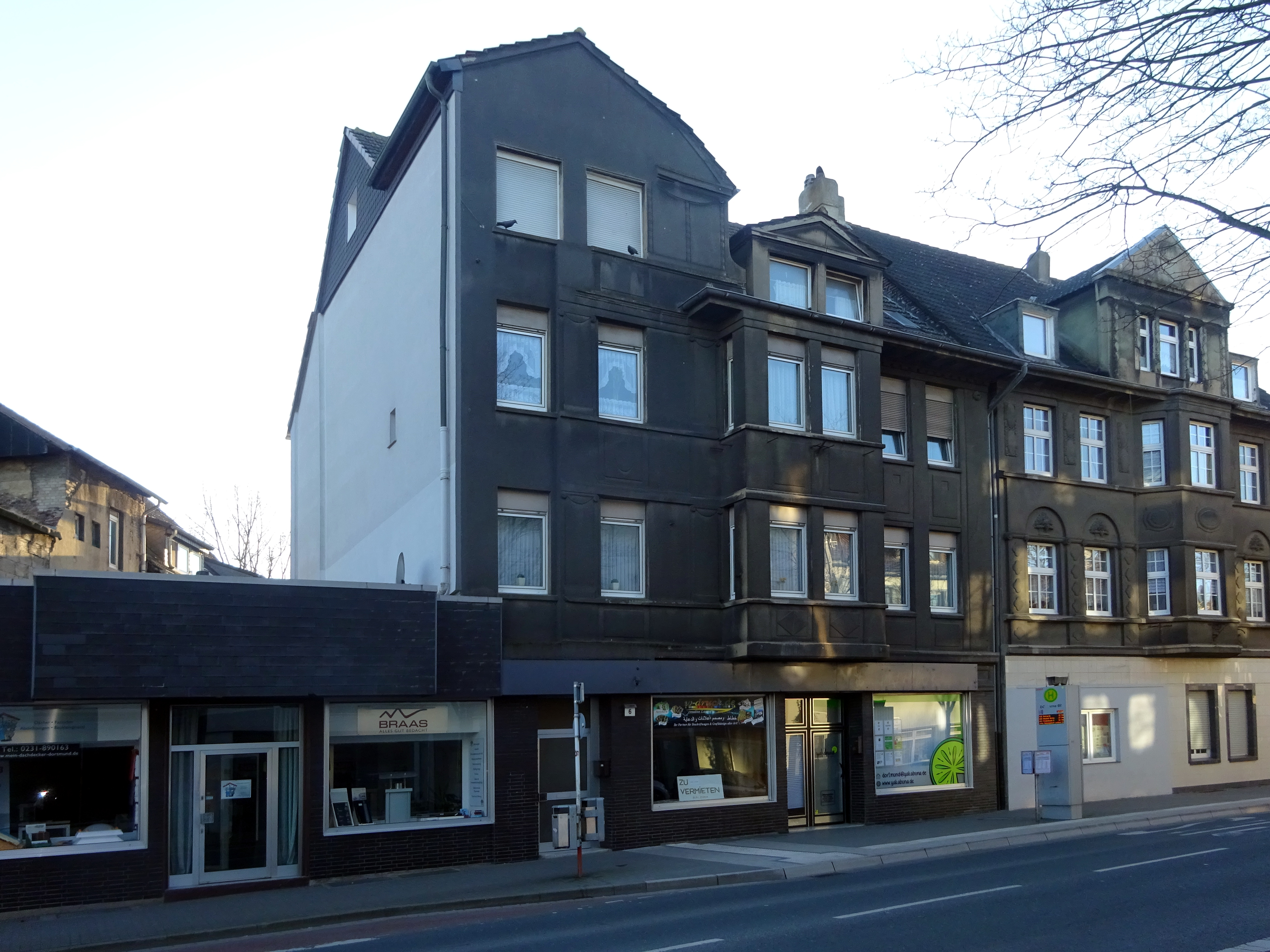 Haus Altenderner Str. 6 in Dortmund